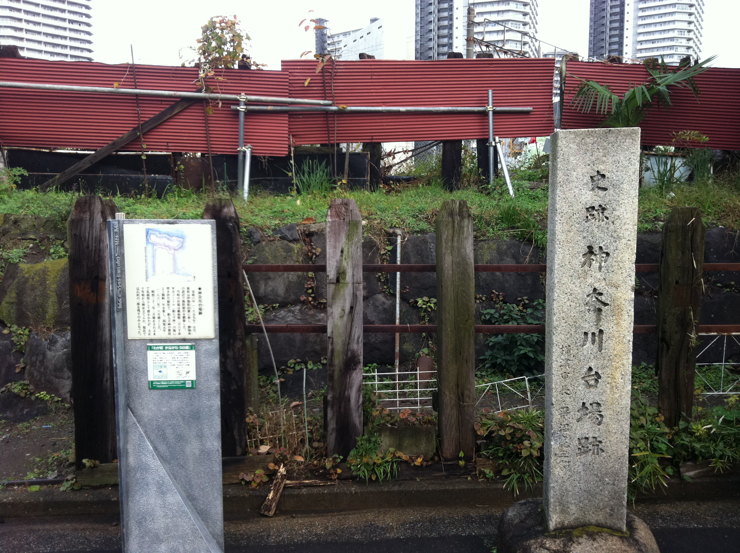 コットンハーバー地区近辺に神奈川台場跡がある。